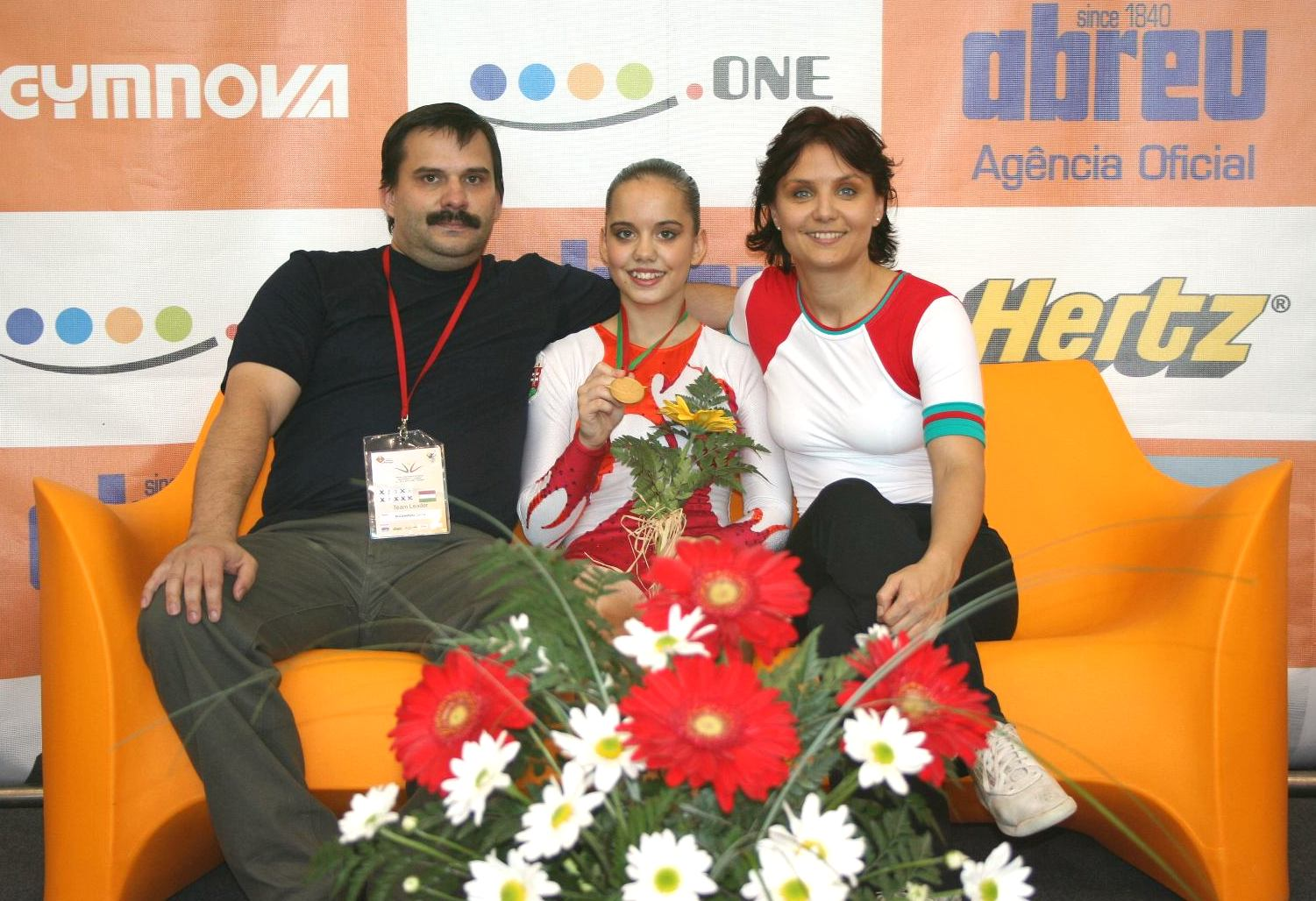 Bucsánszki Linda és szülei (edzői)